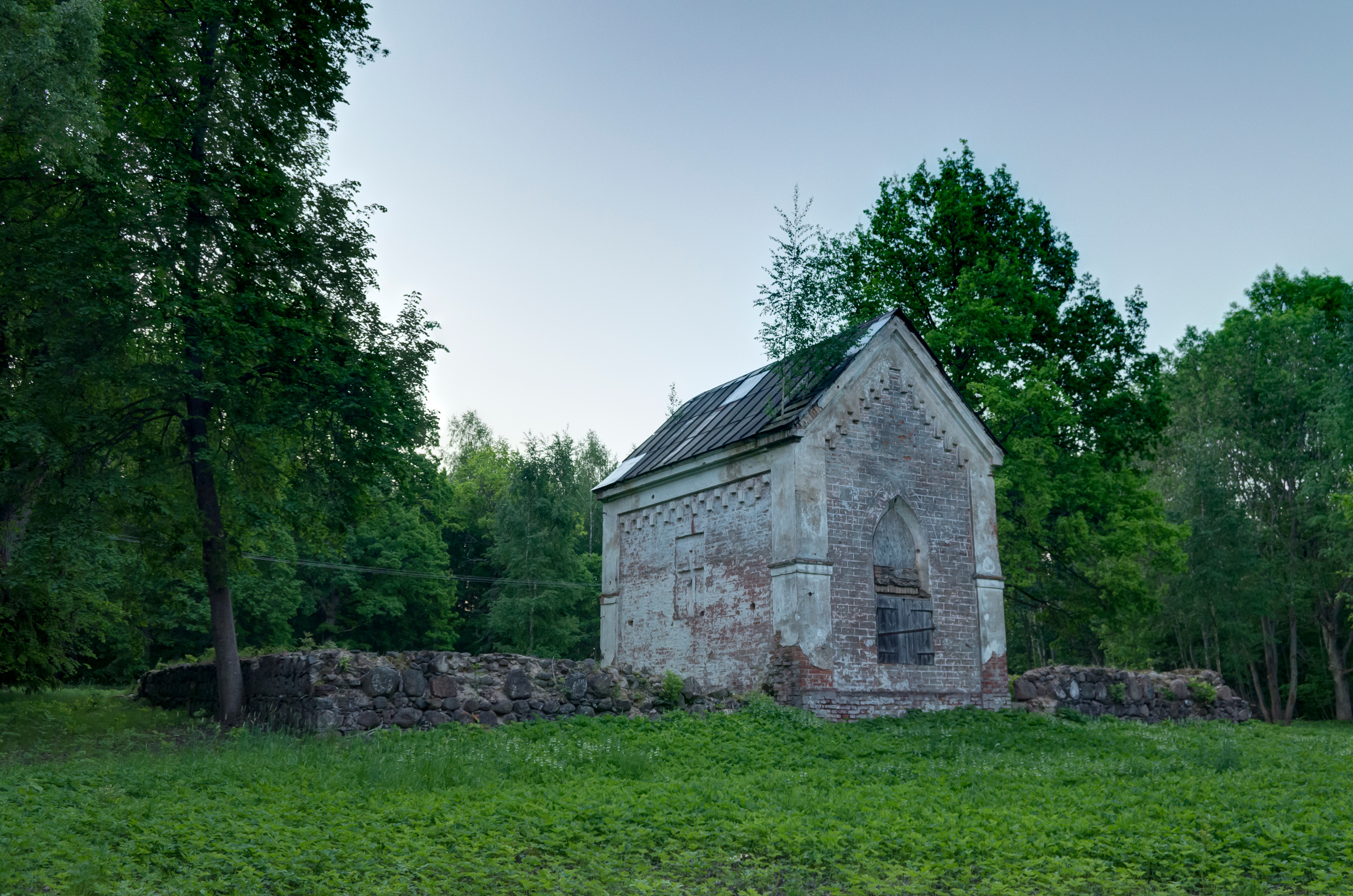 Mäksa mõisa v. Essenite hauakabel. Tagantvaade